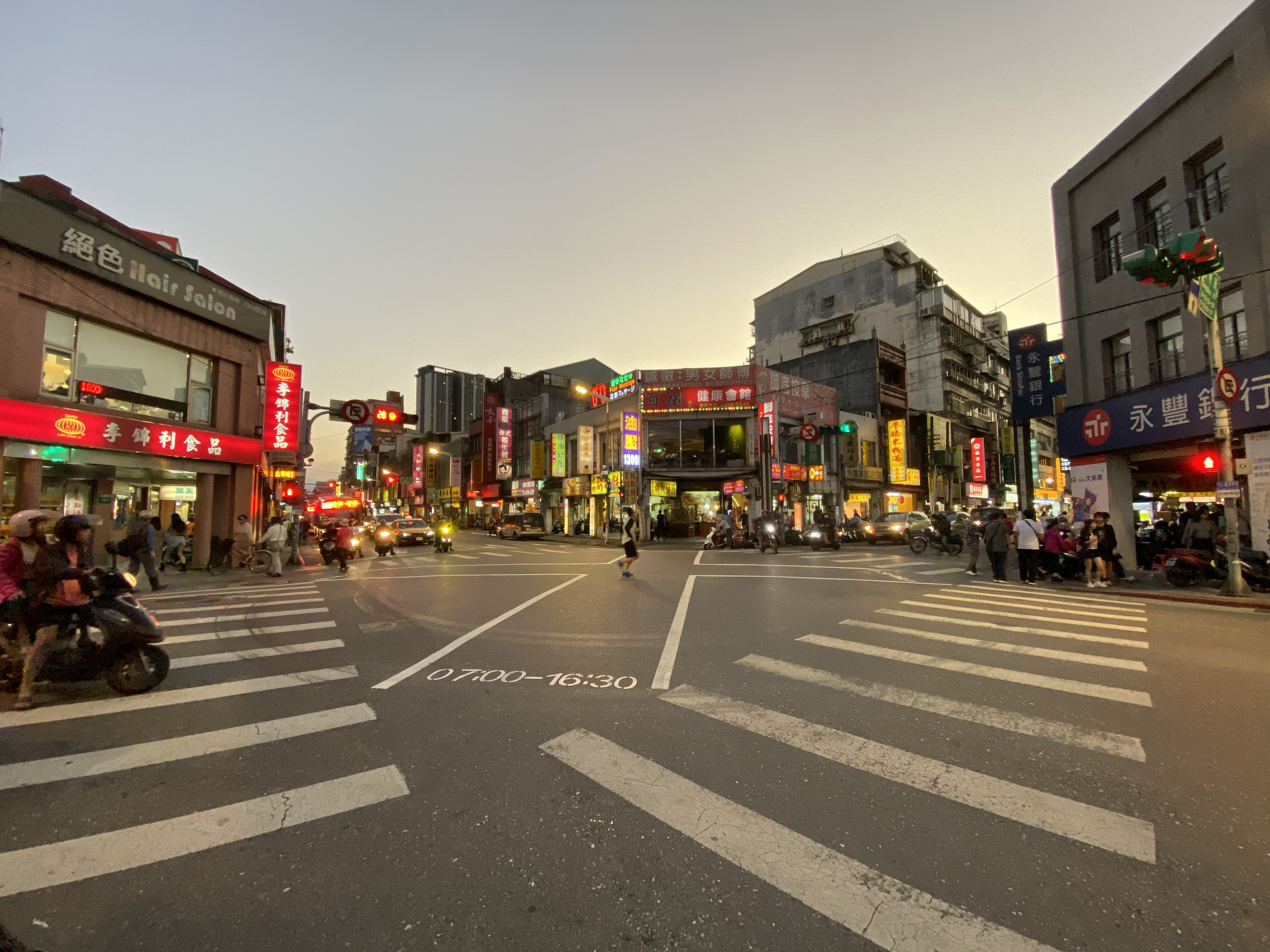 康定路